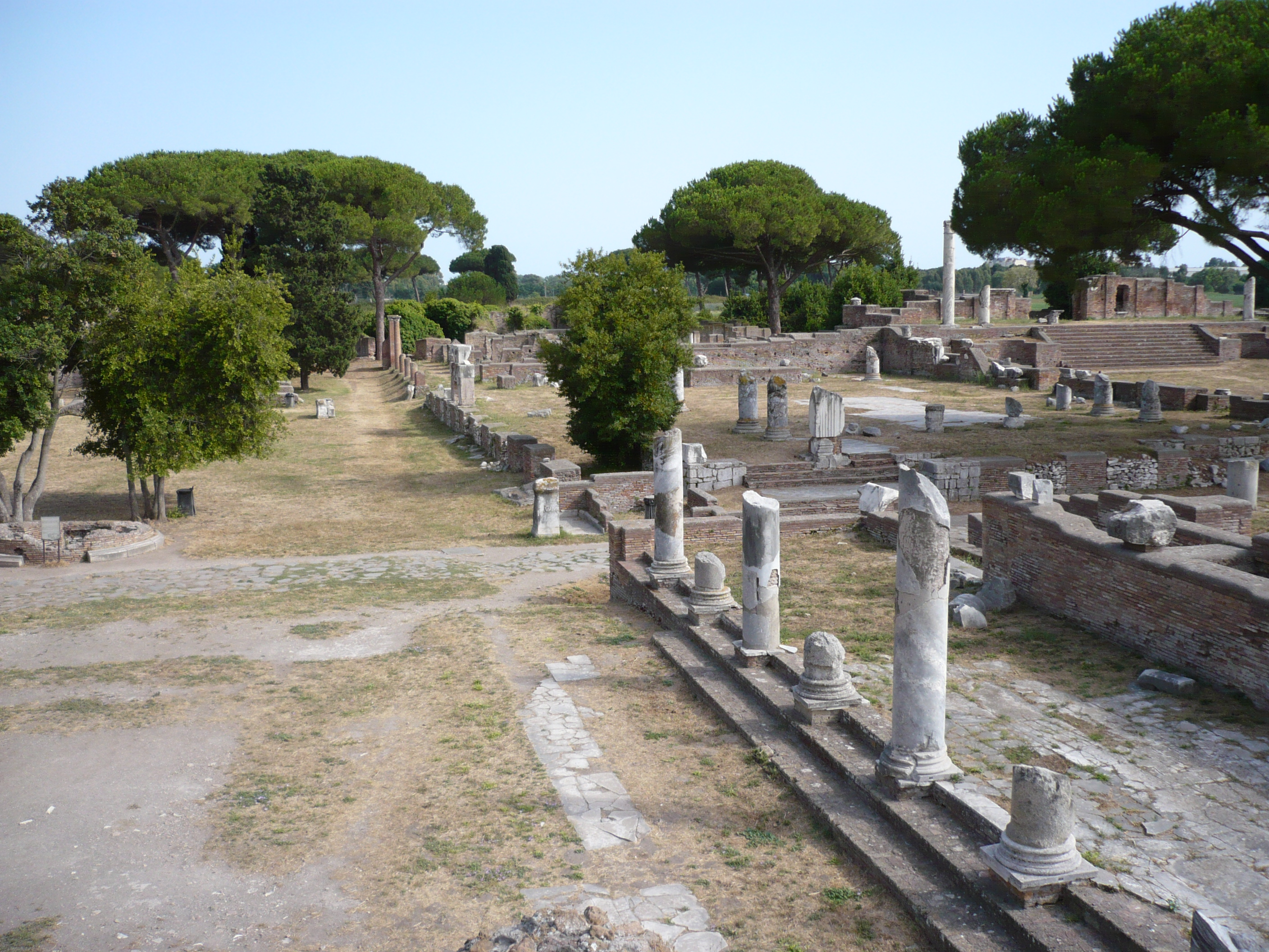 Forum of Ostia Antica / Il Foro di Ostia Antica.